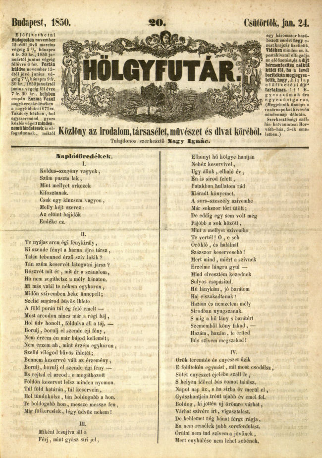 Hölgyfutár. Közlöny az irodalom, társasélet, művészet és divat köréből 1850.